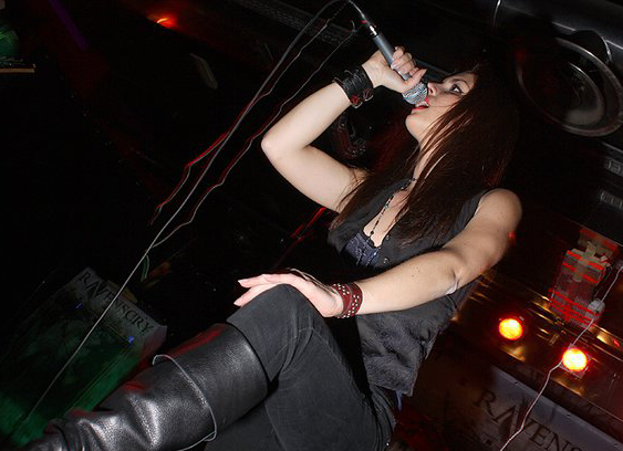 Ravenscry durante un concierto en Milán.